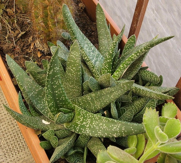 Gasteria hybridis